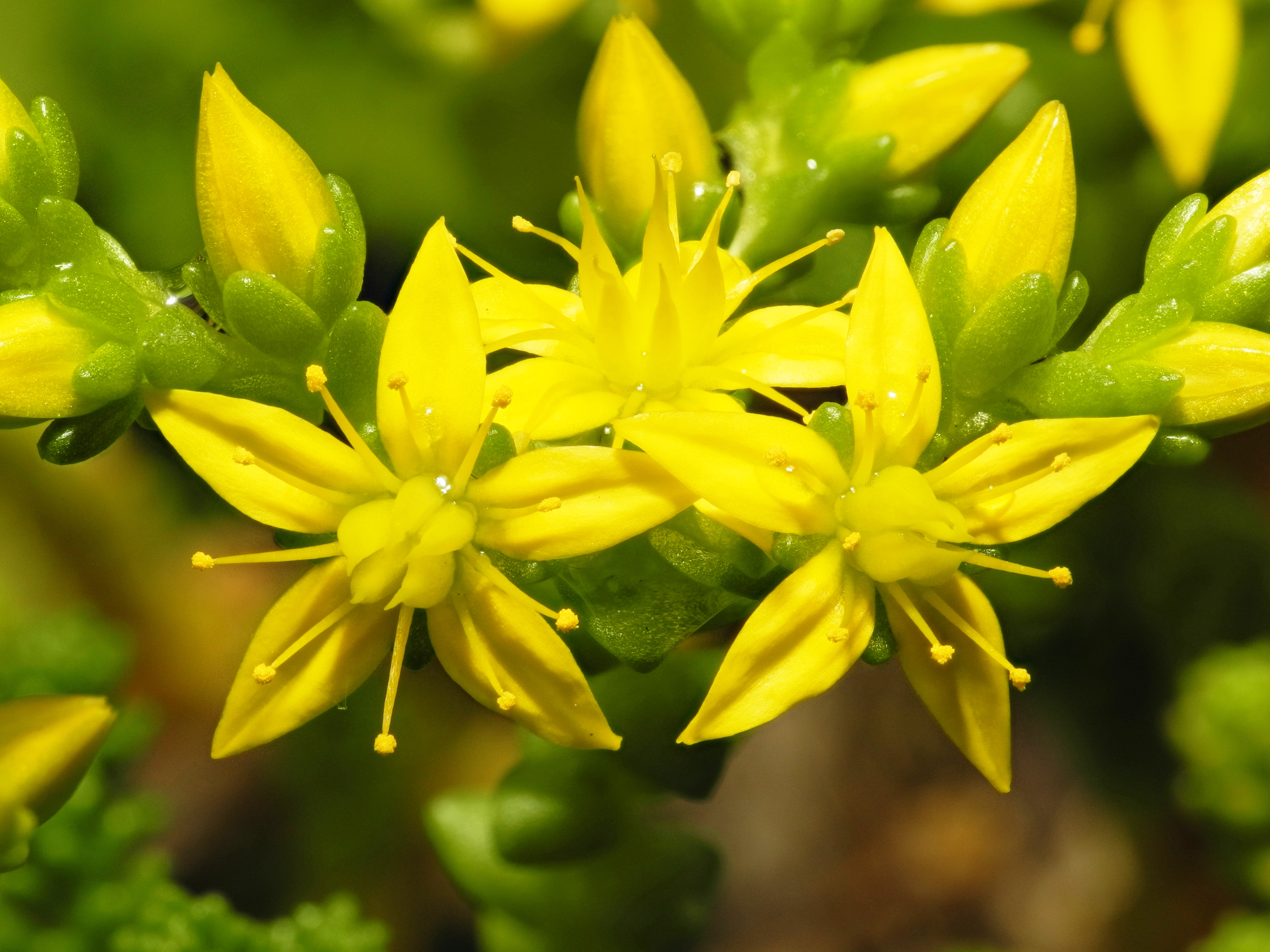 Focus stacking of 9 pictures (using Zerene Stacker).Fleurs de poivre de muraille (Sedum acre) (focus stacking). Image composée de 9 photos prises avec la bonnette Raynox DCR-250 et assemblées avec Zerene Stacker.